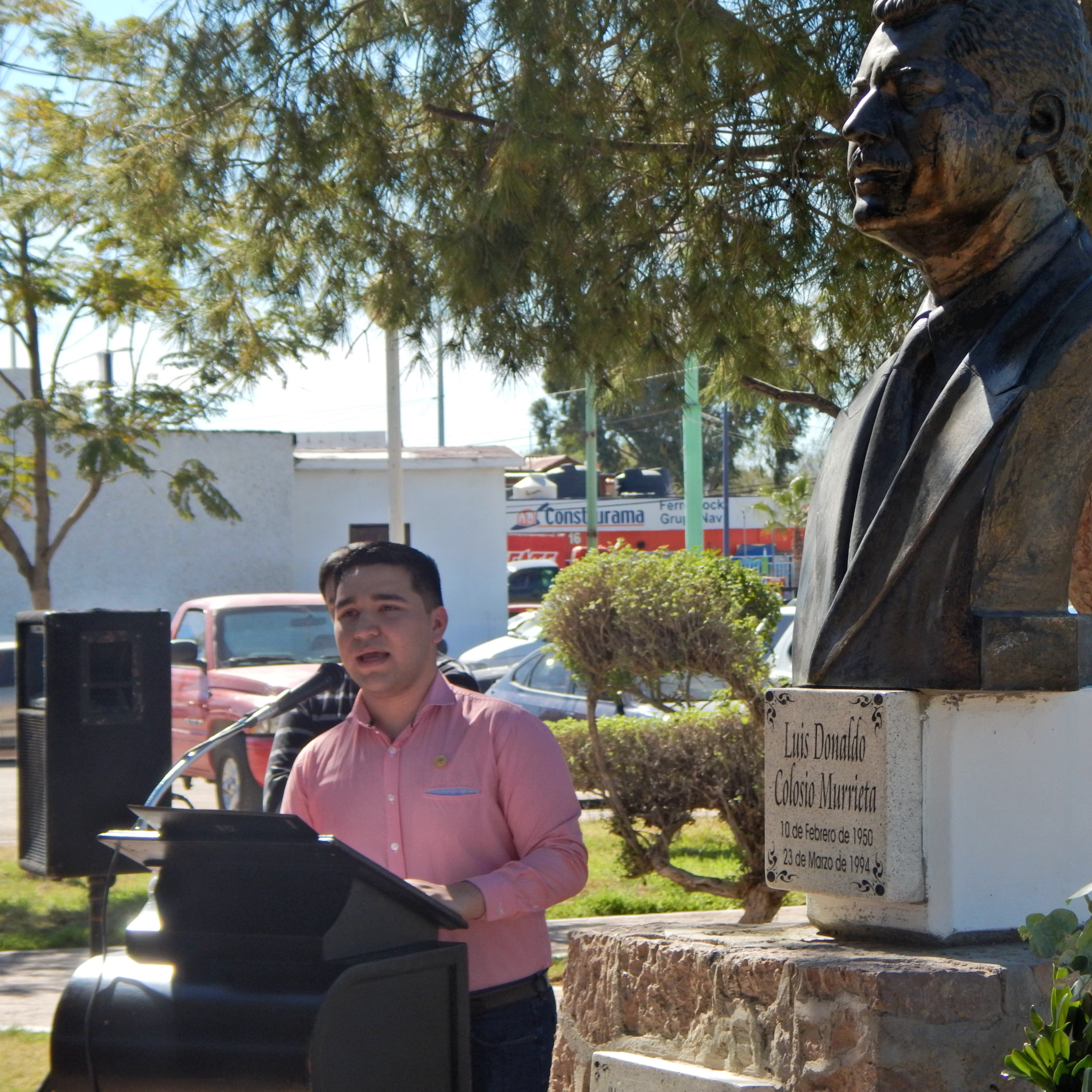 René Zubiri dando discurso durante entrega de apoyos educativos.